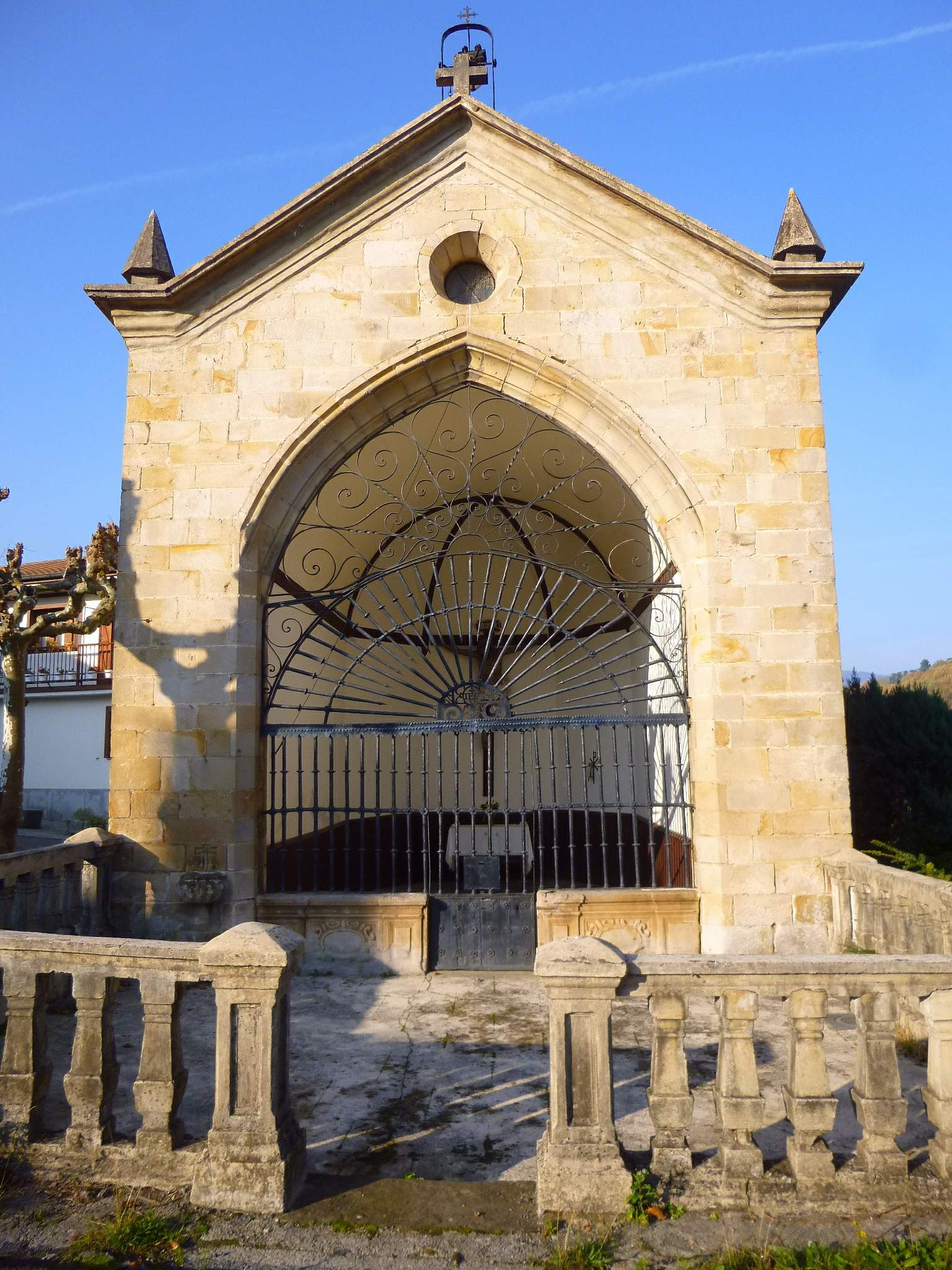 Segura (Gipuzkoa) - Ermita de Santa Cruz